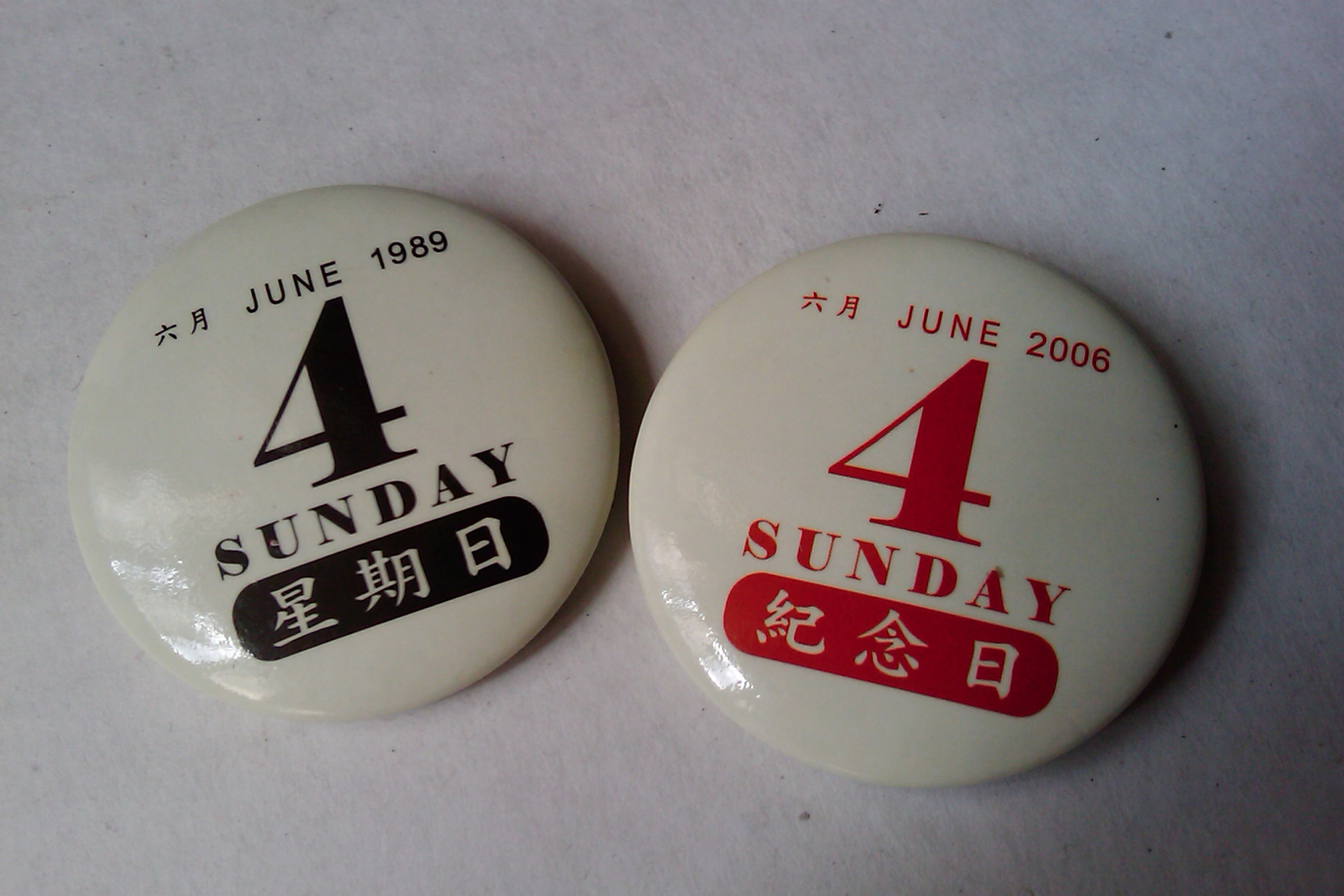 中文（香港）: 2006年六四襟章。